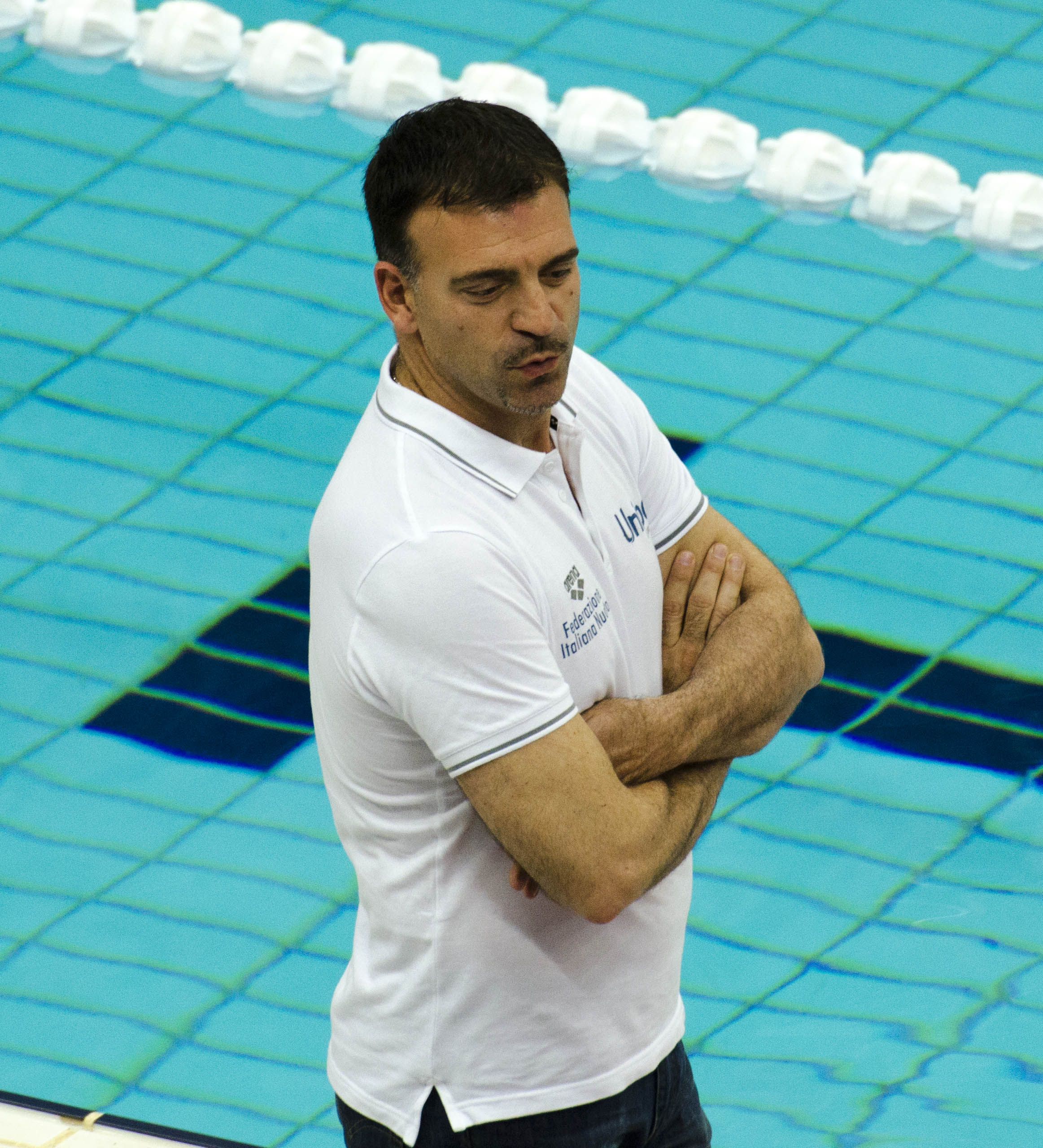 Scattata Durante la Final Eight di World League al Water Cube di Pechino